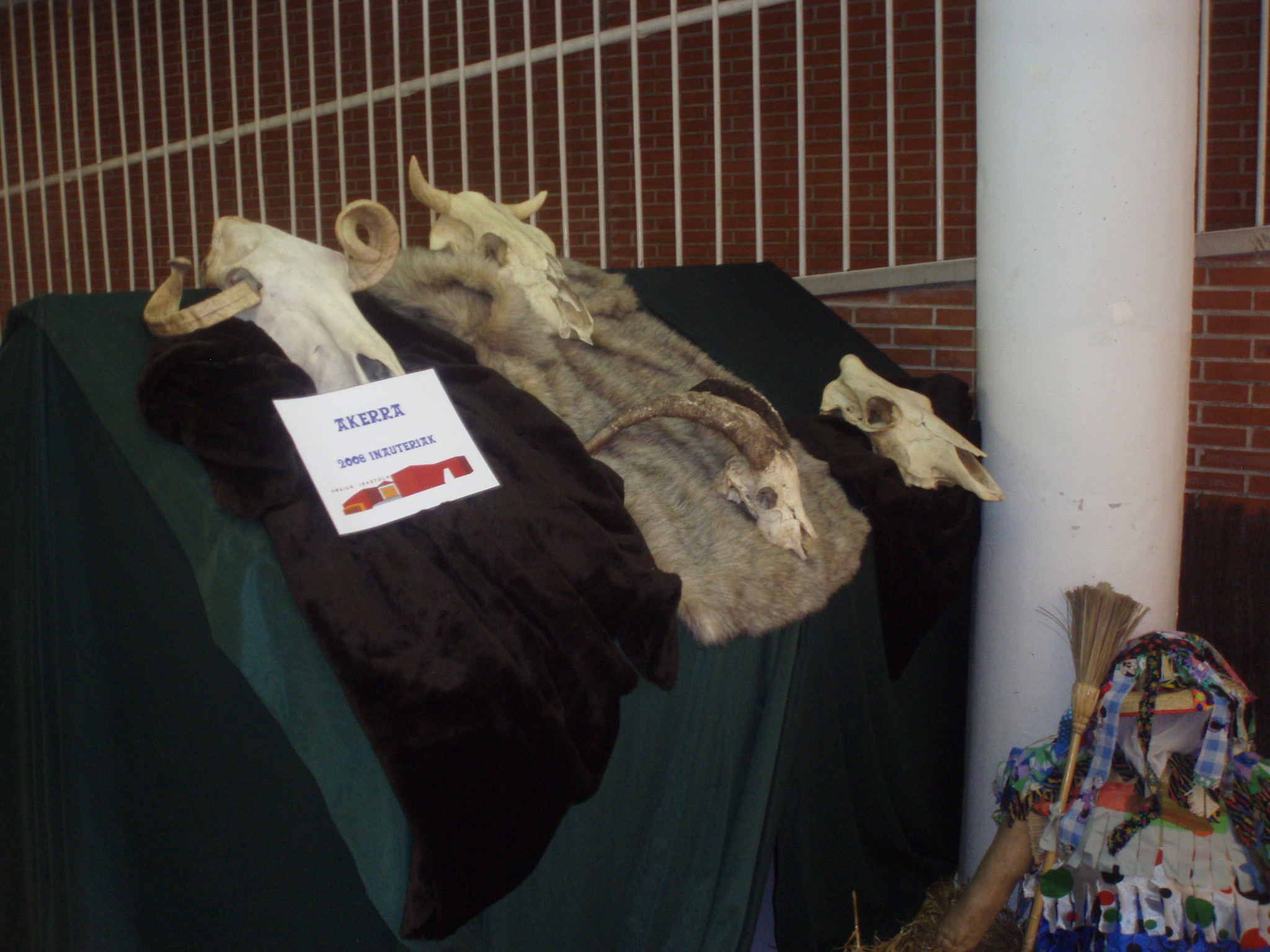 Personaje del carnaval vasco en la Ikastola Amaiur de Pamplona